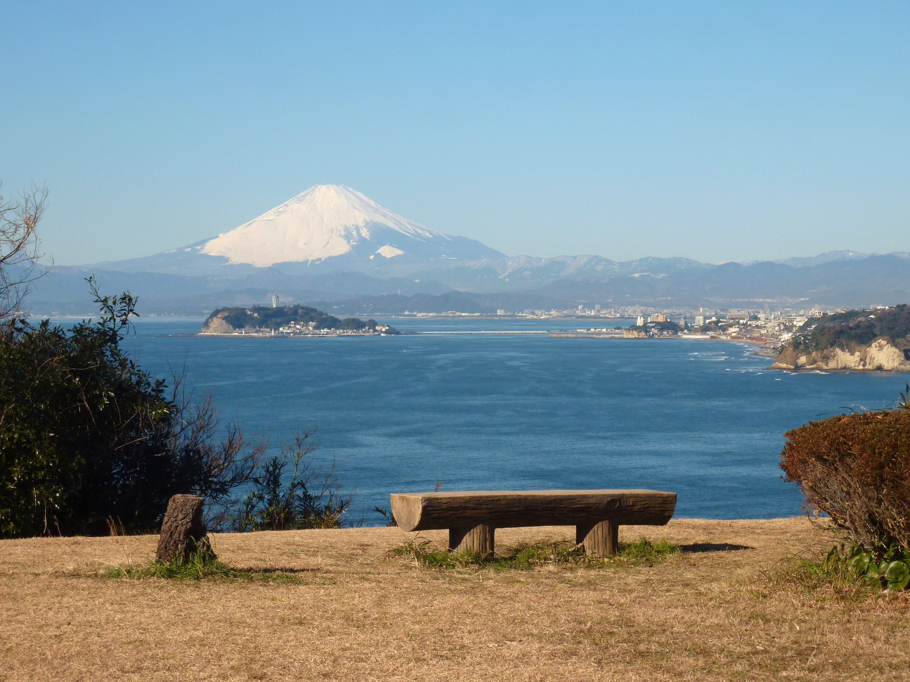 神奈川県逗子市・大崎公園からの富士山